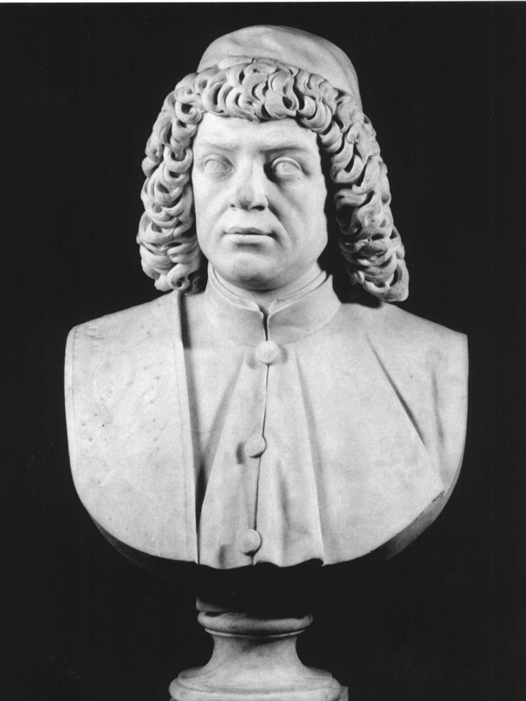 Busto di Giovanni Bellini, opera di Lorenzo Larese Moretti del 1858. Il busto fa parte del Panteon Veneto, conservato presso Palazzo Loredan di Campo Santo Stefano a Venezia.